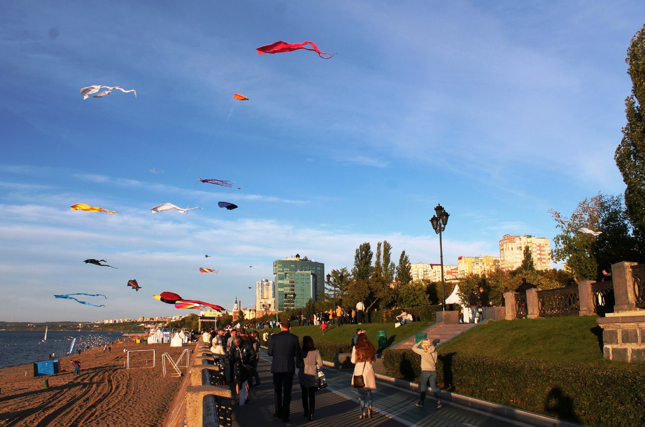 Самарская набережная во время фестиваля набережных в сентябре 2015 года